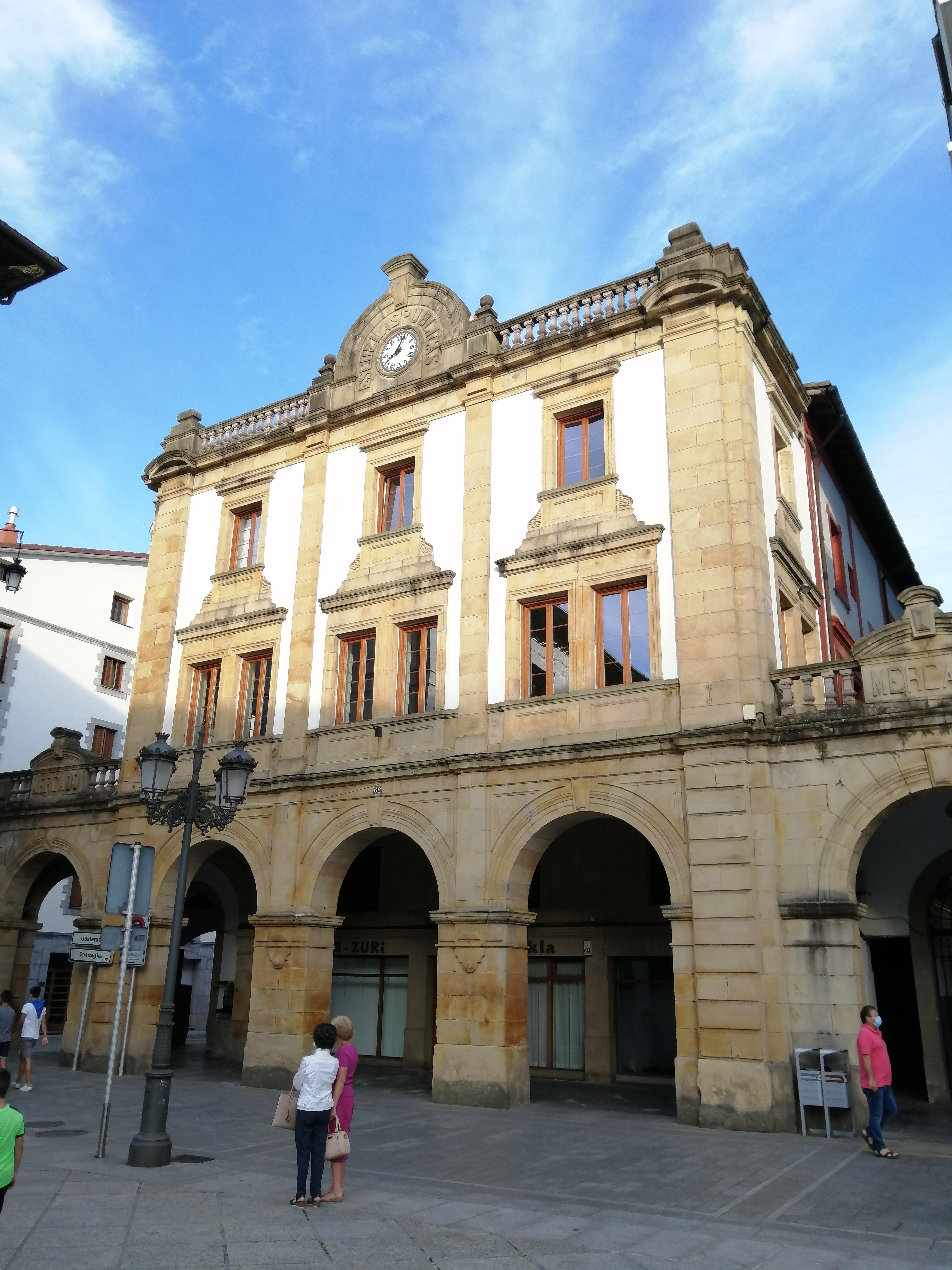 Merkatua, Azkoitia